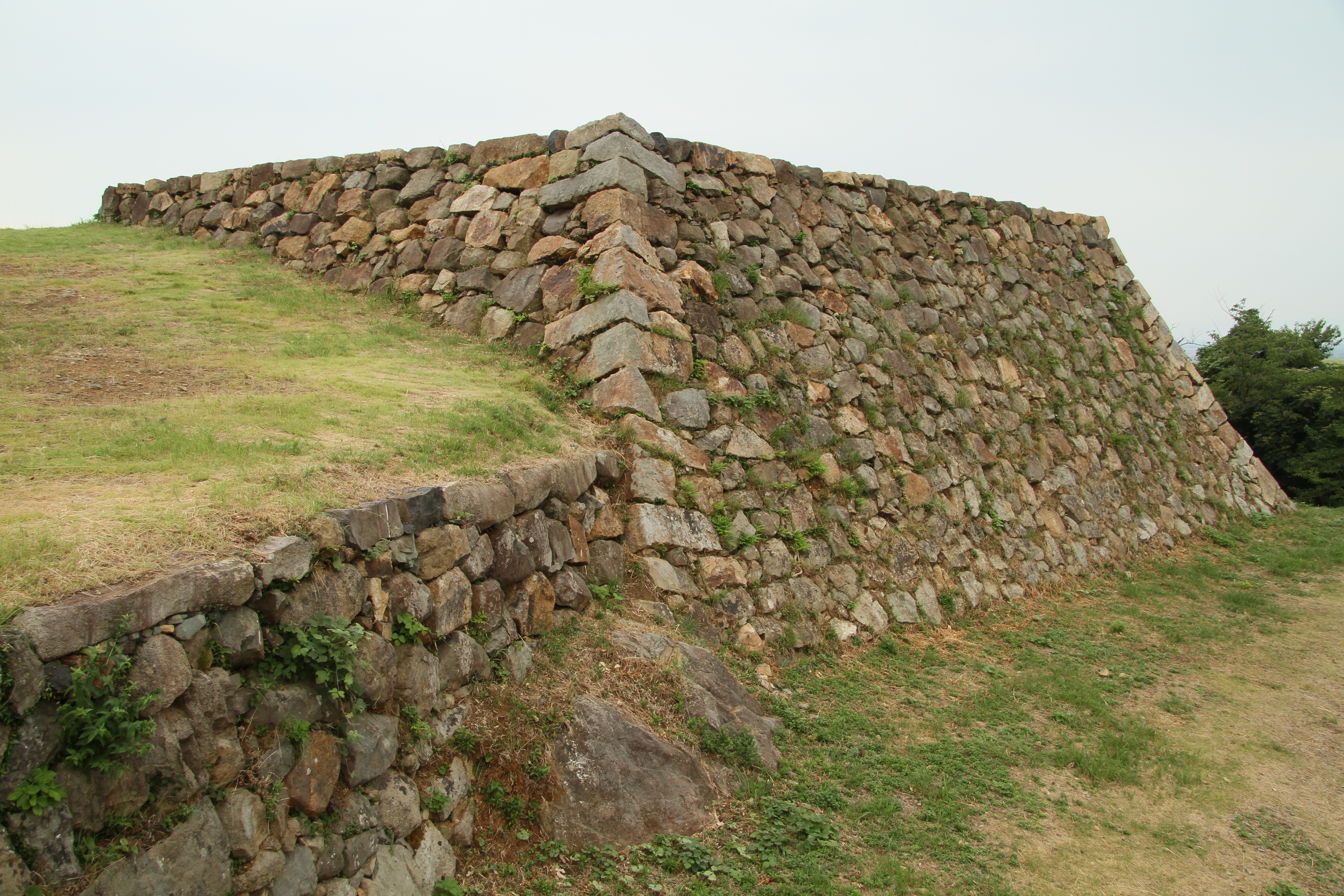 米子城の天守台石垣